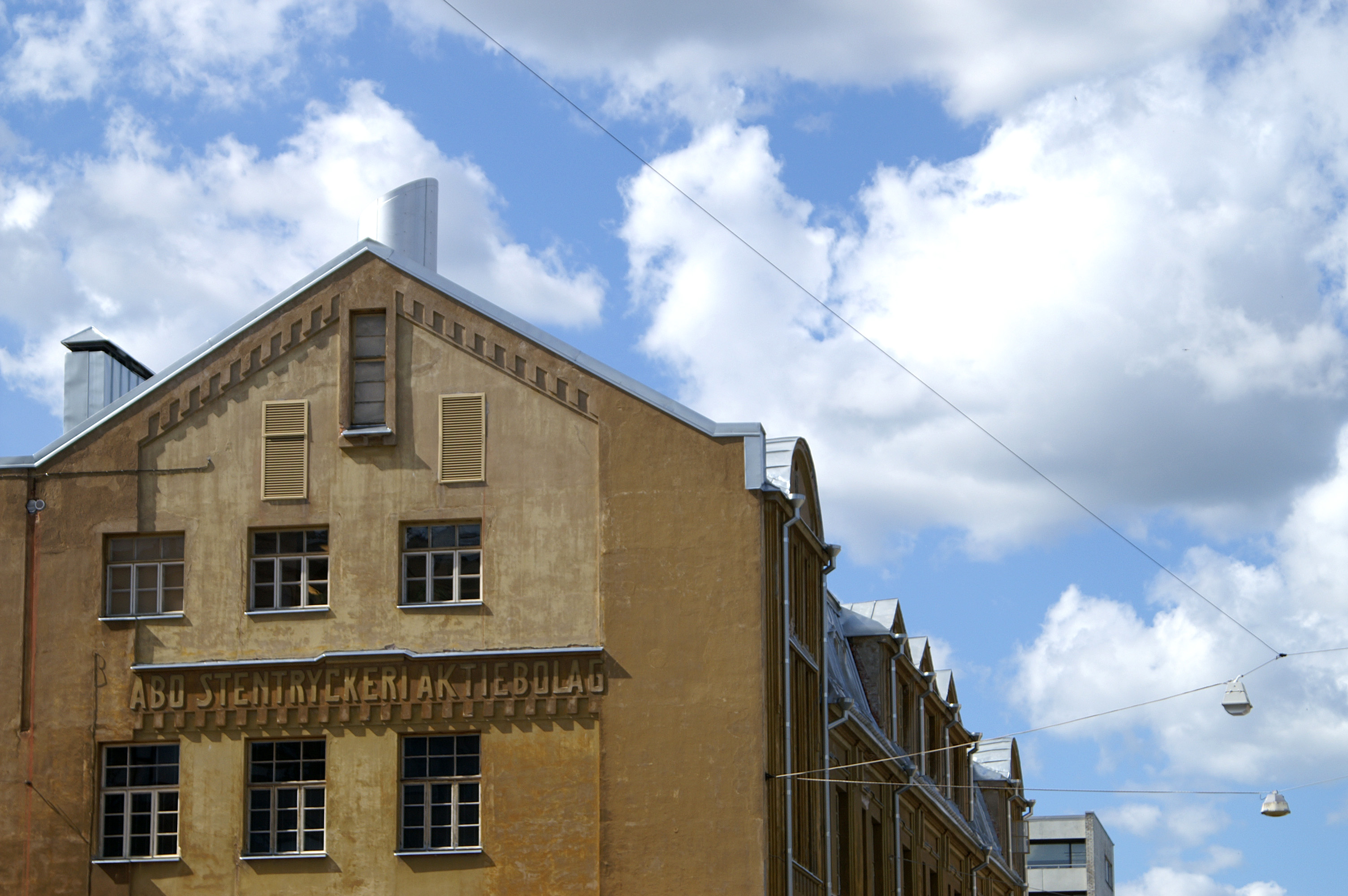 Vanha kivipaino Turussa. Rakennuksessa toimii nykyään Linnateatteri.